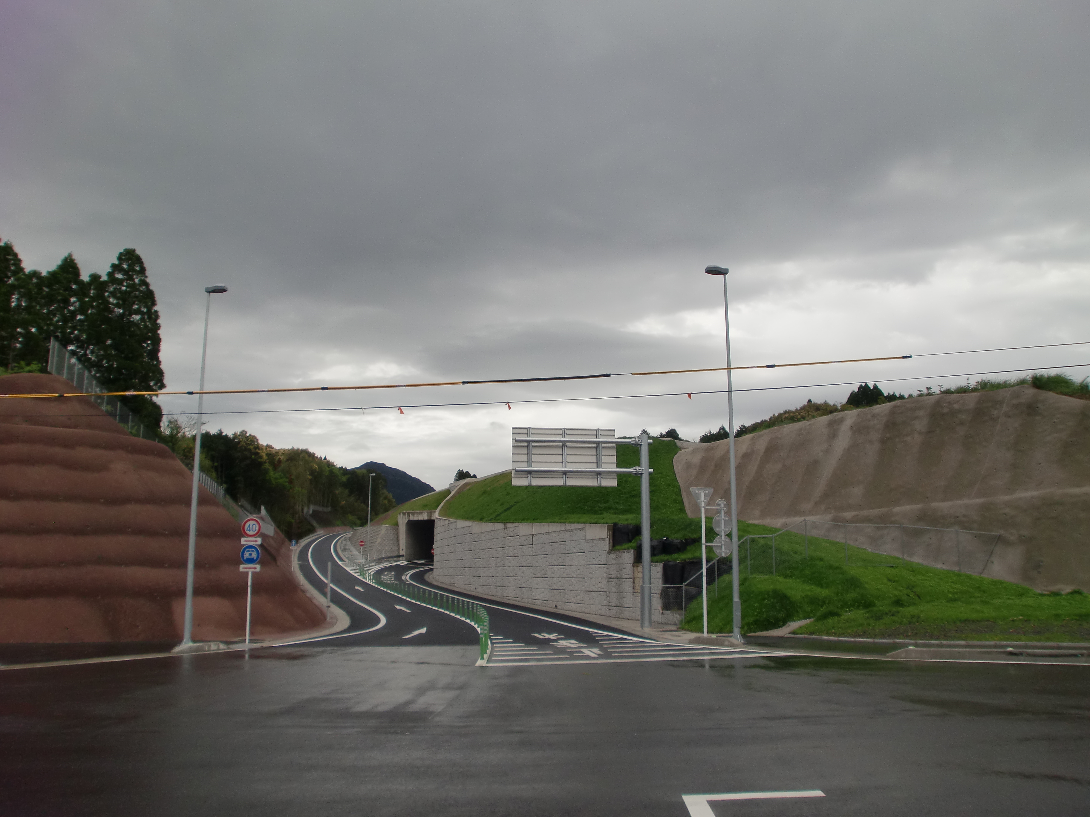 北薩横断道路のさつま広橋インターチェンジの鹿児島空港方面入口を望む。